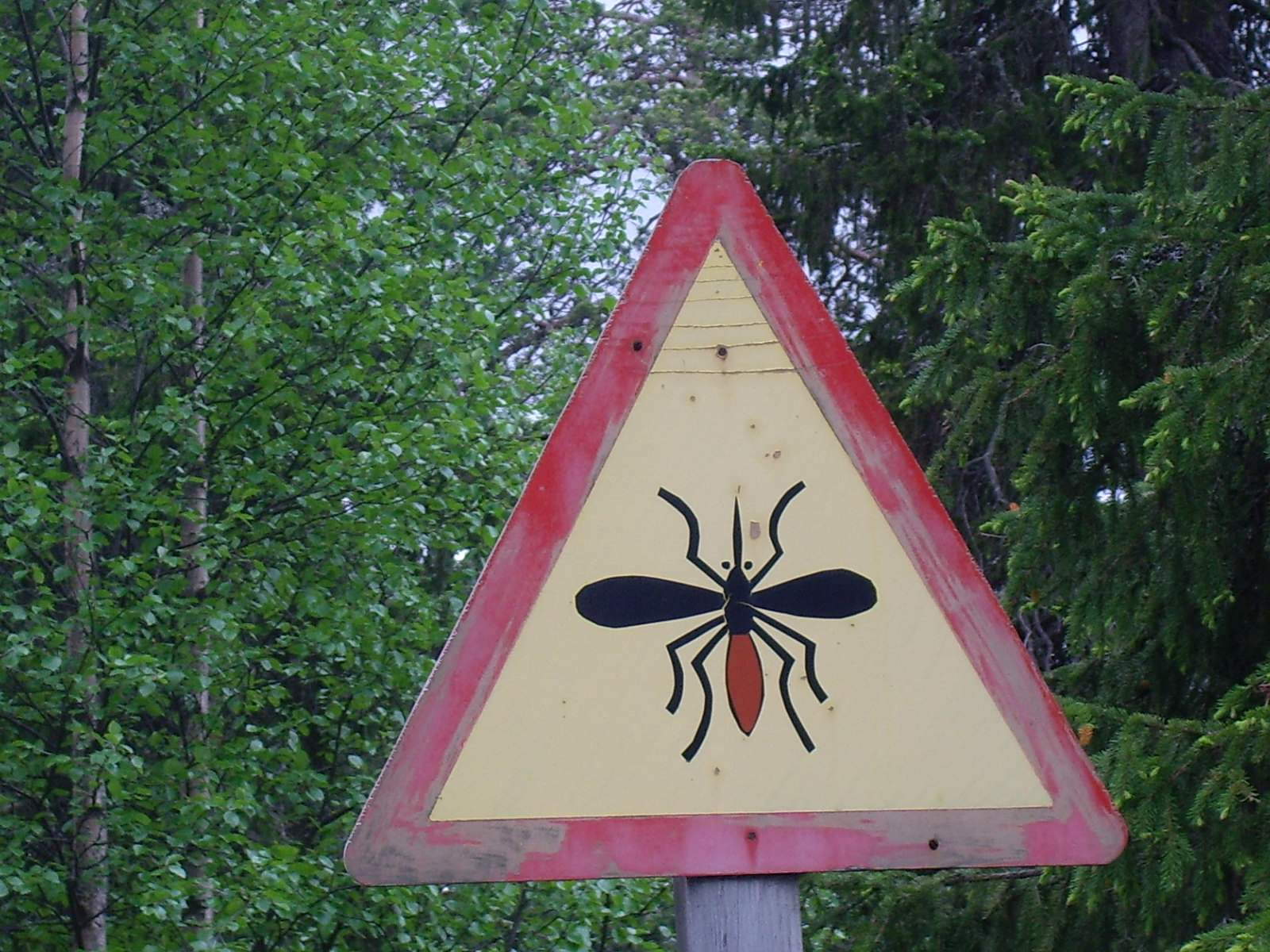 Senyal de perill de ser picat per mosquits (Finlàndia)